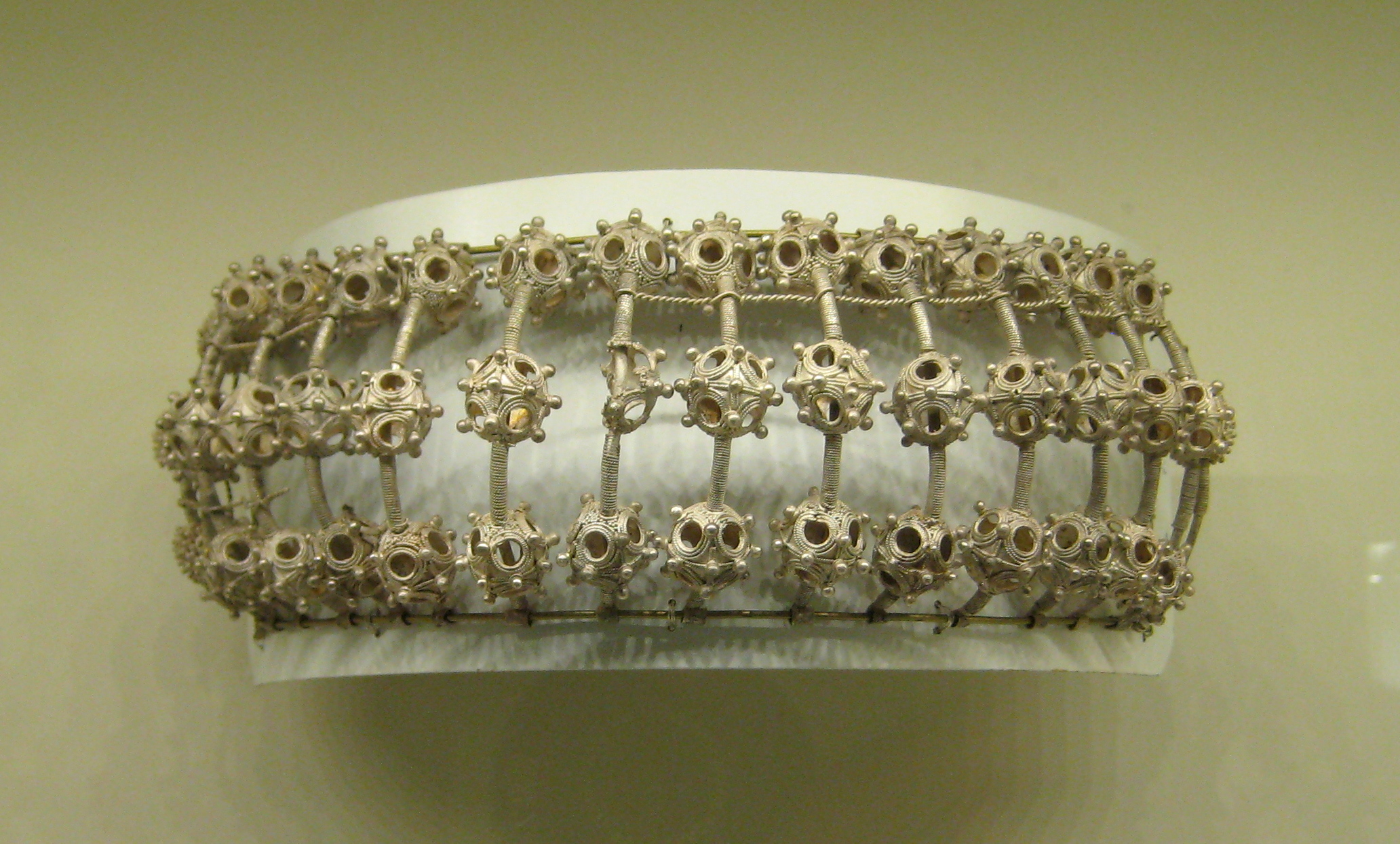 Клады, выставленные в подклете Благовещенского собора Московского кремля. Аграфы - украшение головного убора в виде дужек с тремя бусинами. Русь, 12 век. Серебро, скань, зернь, пайка.